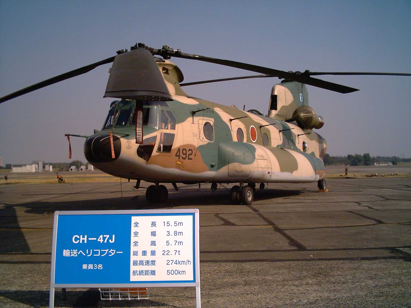 Chinook_(CH-47J) Iruma Airbase 2006 Japan